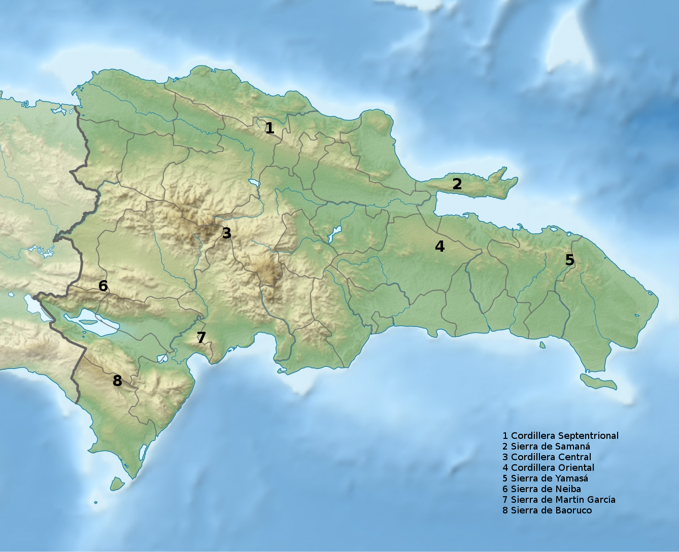 Kopie van File:Dominican Republic relief location map.jpg met gemerkte bergketens en index